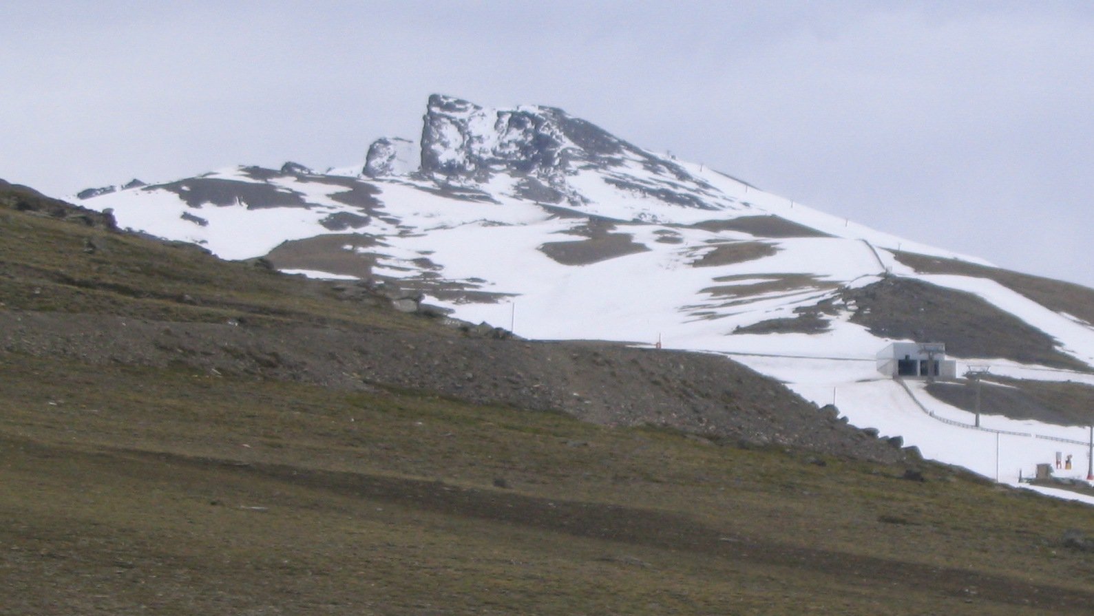 Pico Veleta, Sierra Nevada (Andalucia, Spain)